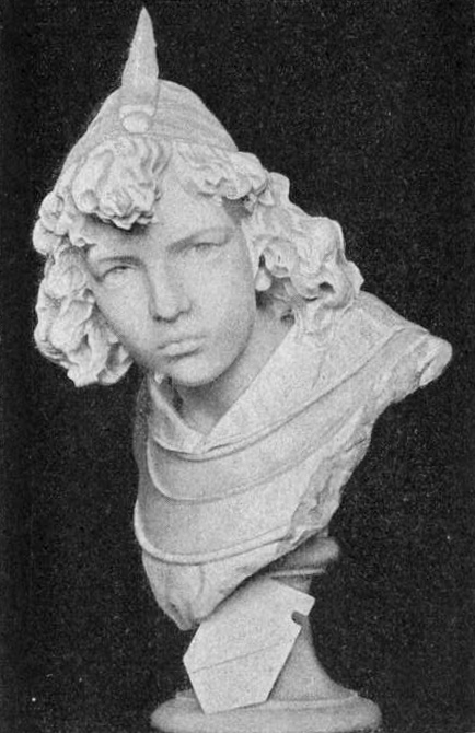 Büste eines Pagen